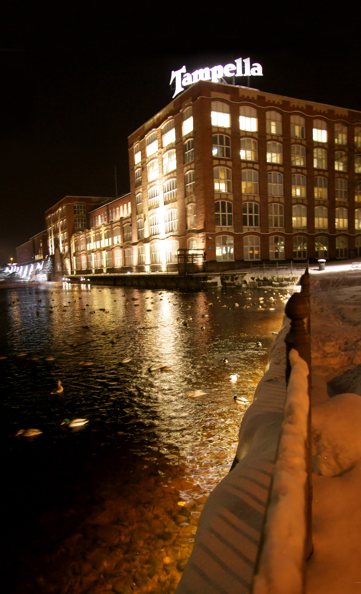 Tampellan vanha tehdasrakennus kyltteineen. Rakennus, jonka katolla Tampella-kyltti on, on nykyään Tampereen oikeustalo.